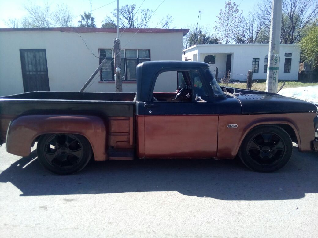 Dodge D100 1965 de mi amigo Jose Martín desde Muzquiz Coahuila México. #FierrosViejosClub